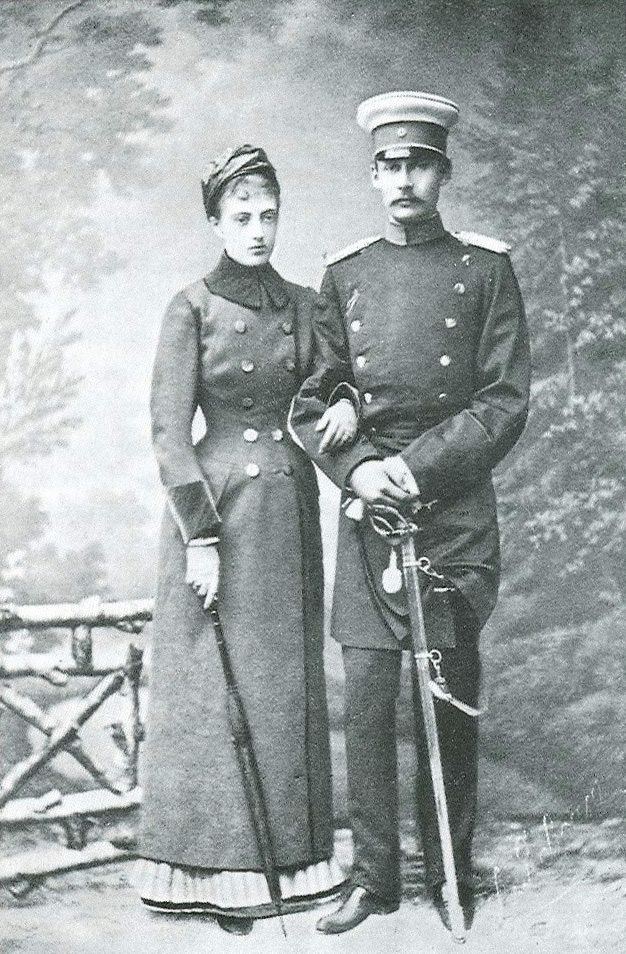 Frederik Frans III van Mecklenburg-Schwerin en zijn vrouw Anastasia in het jaar 1880